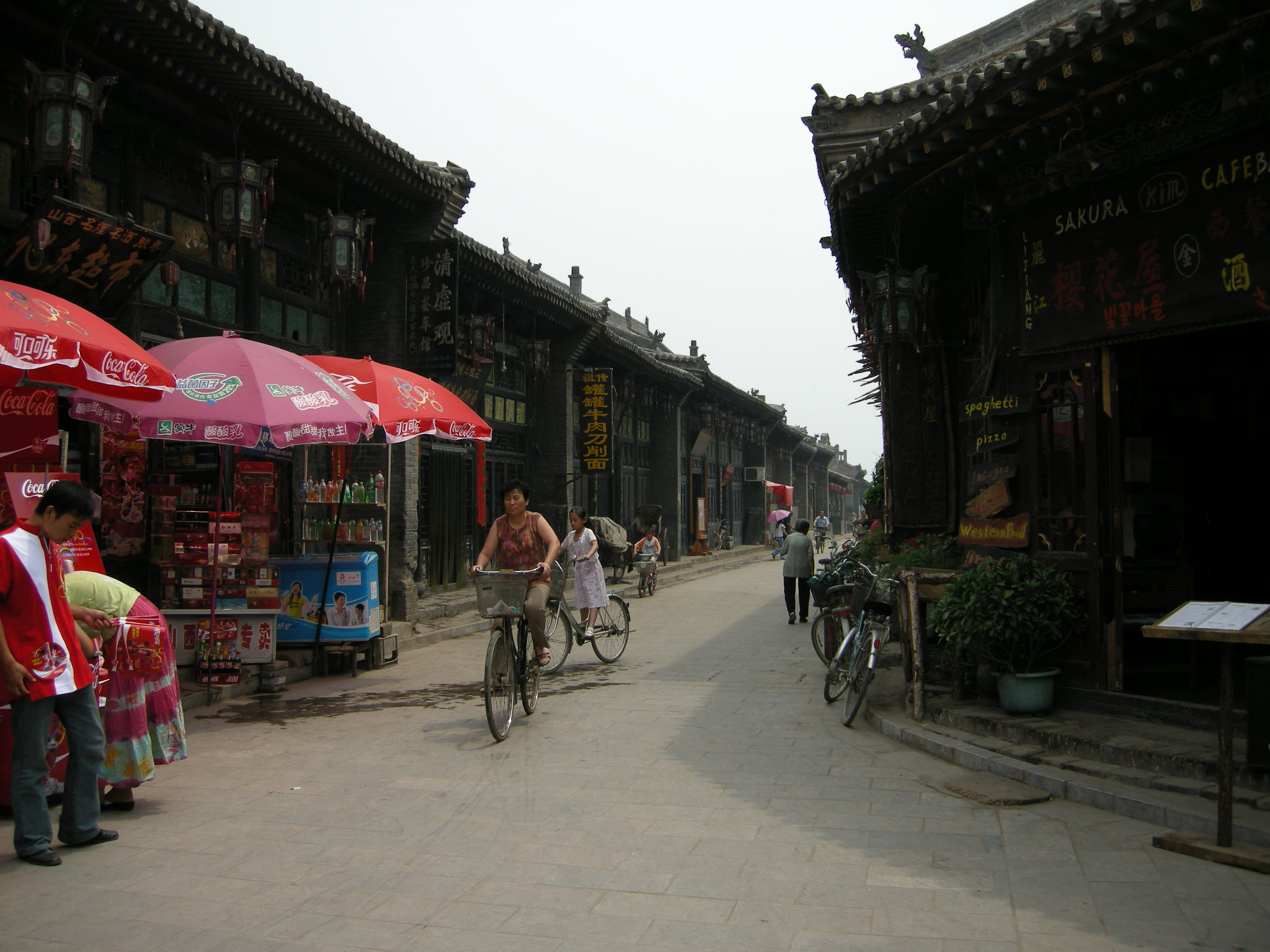 Pingyao, Shanxi, China